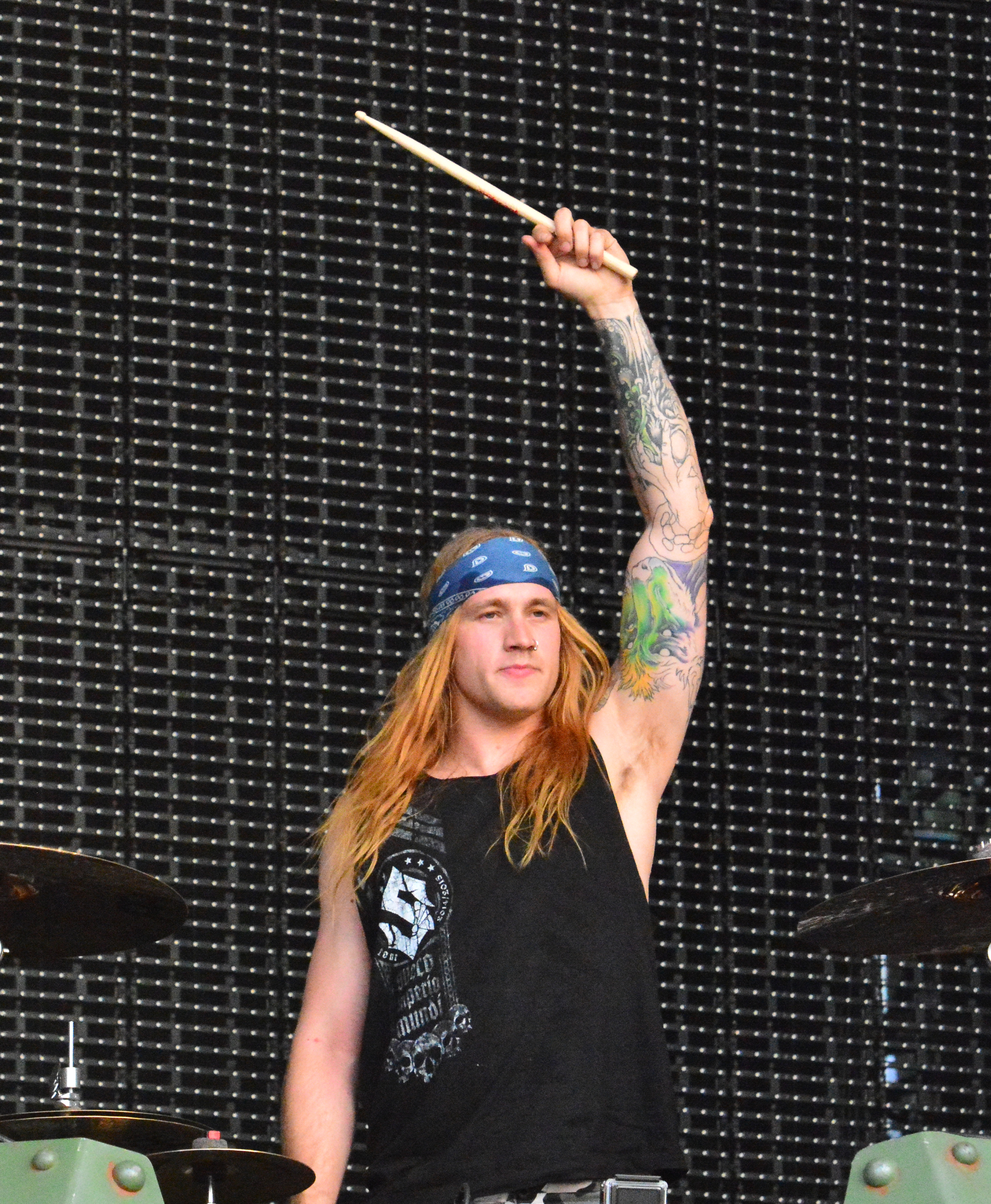 Sabaton beim Wacken Open Air 2015